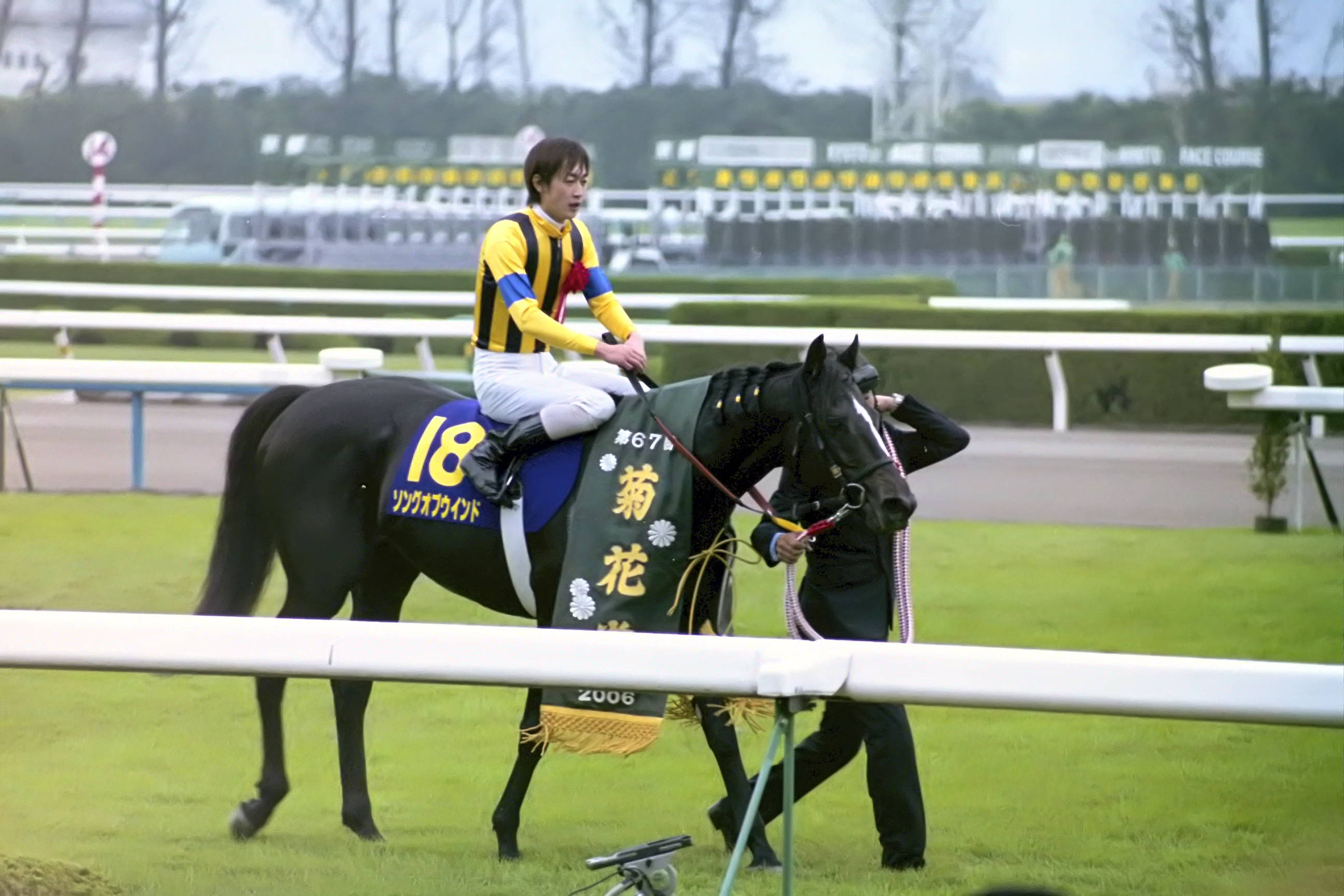 第67回菊花賞優勝馬 ソングオブウインド号